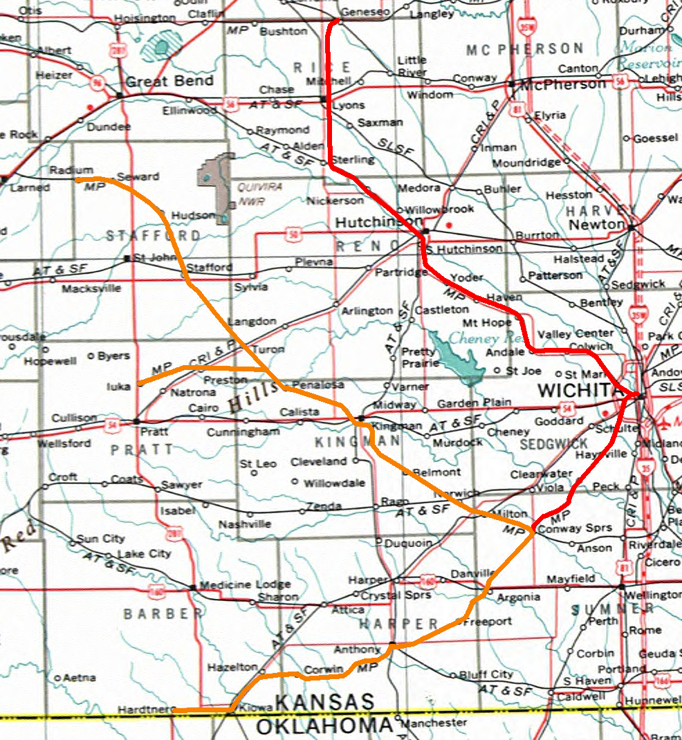 Karte der Kansas Southwestern Railway